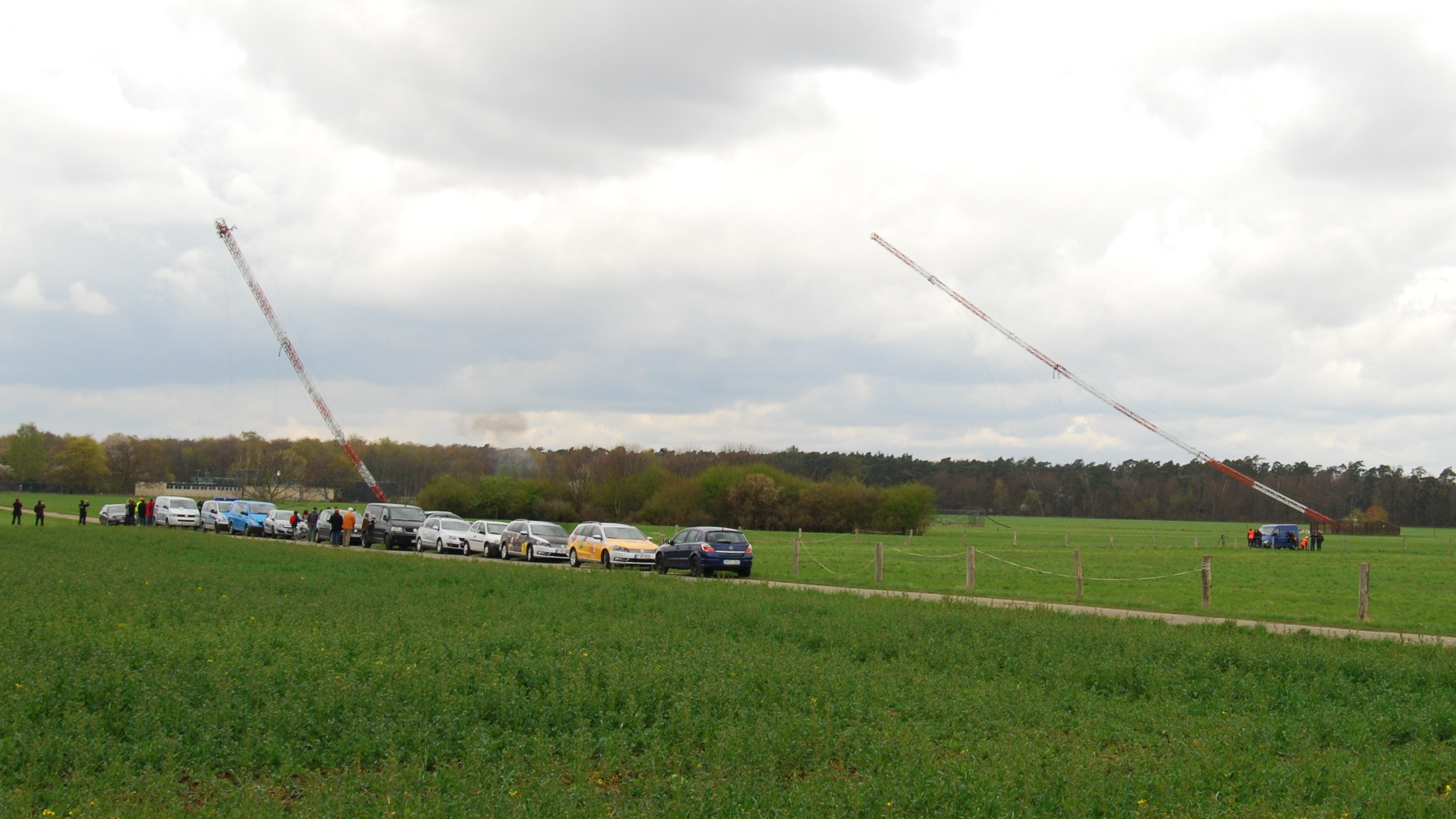 Sprengung der Sendemasten des Mittelwellensenders (Rodgau-)Weiskirchen bei Hanau, Hessen, Deutschland.